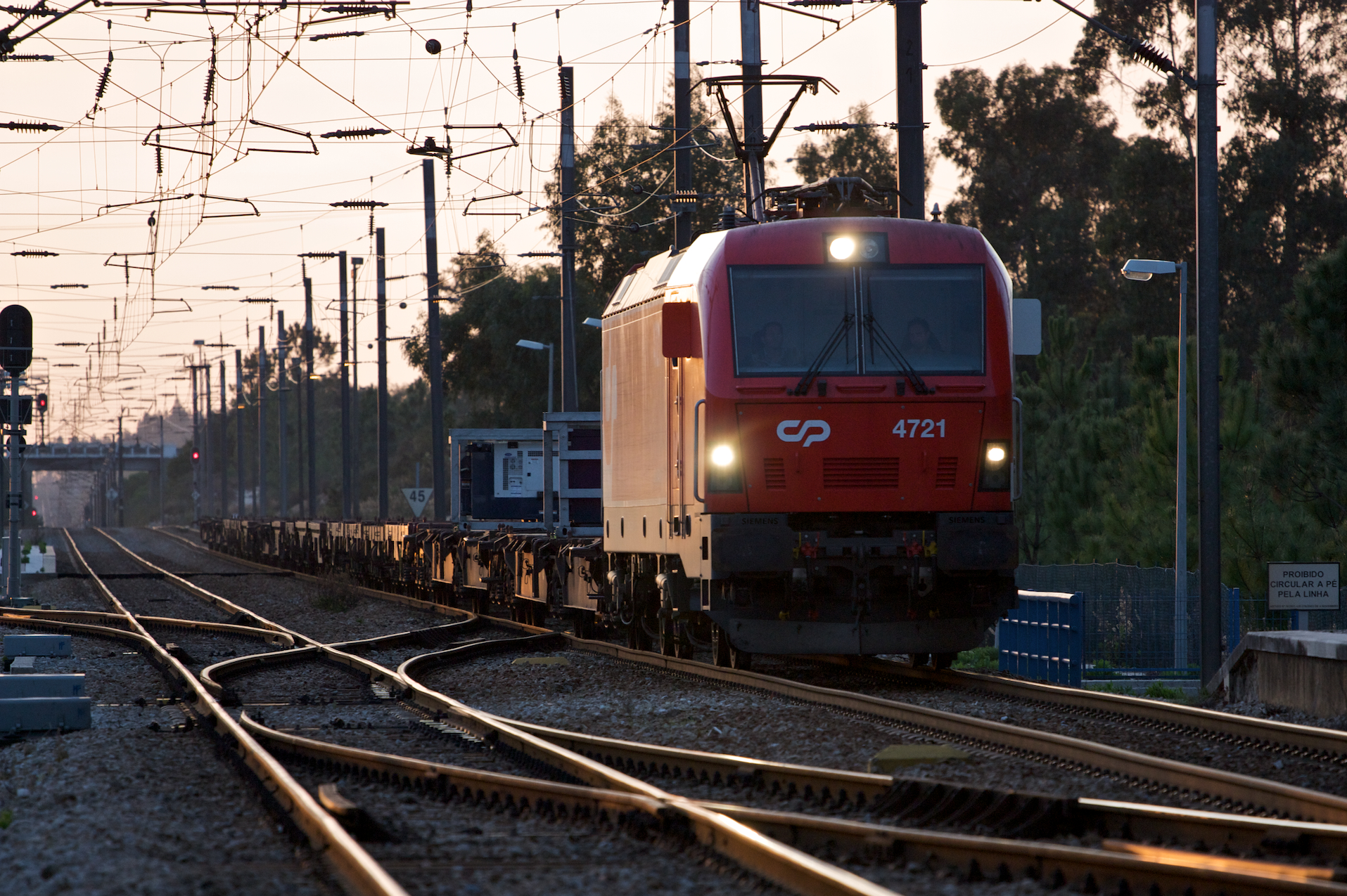 Tipo: Comboio de Transporte de Contentores 81830/1 (material vazio) [Sines - Bobadela] Local: Estação de Bombel [Linha do Alentejo, PK 51] Data e hora: 11 de Novembro de 2009 [17h14] Material: Locomotiva 4721 + xx vagões CP Sggmrss e outros